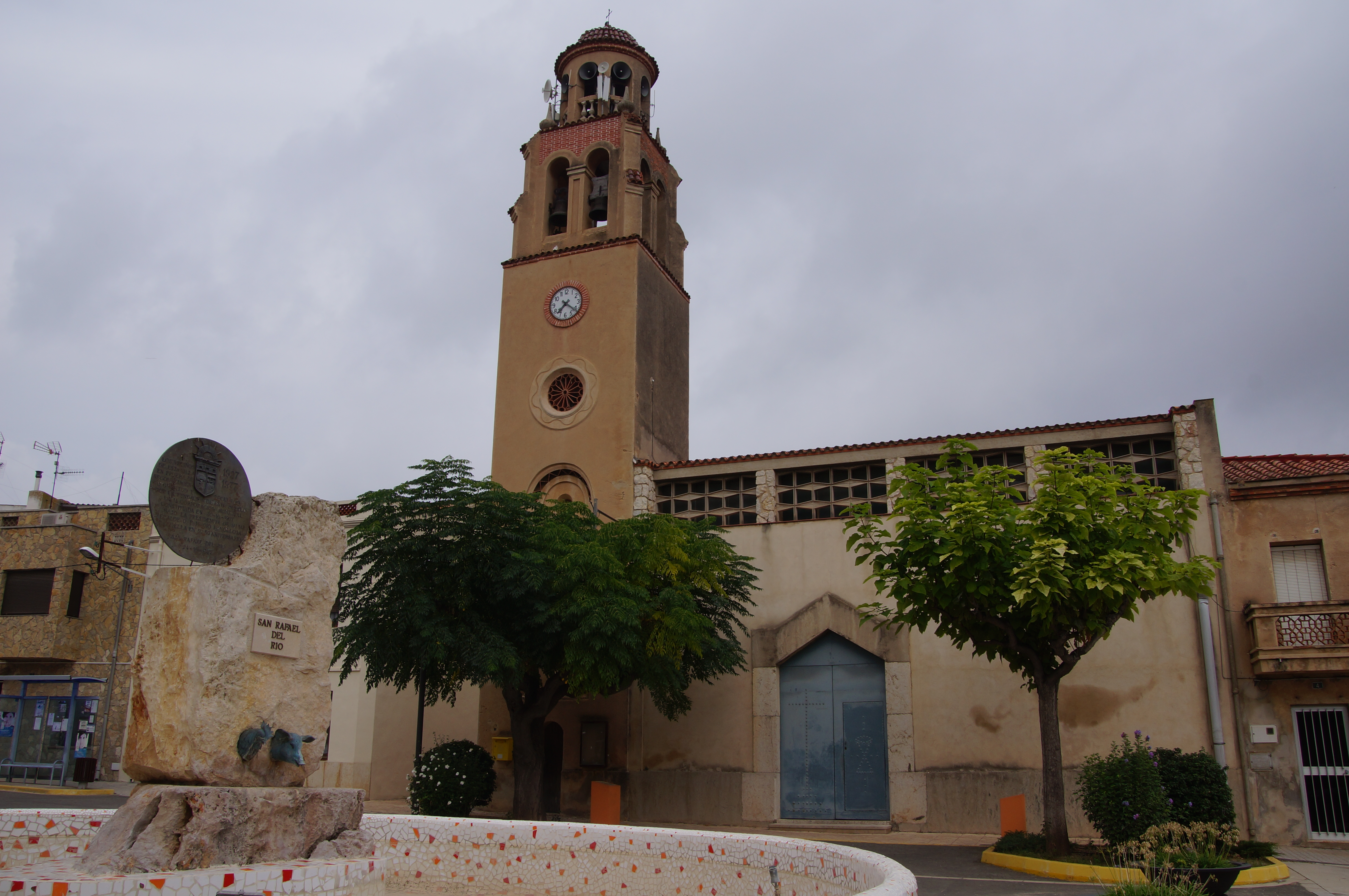 Església parroquial de Sant Rafel (Sant Rafel del Riu) 03.101-001.